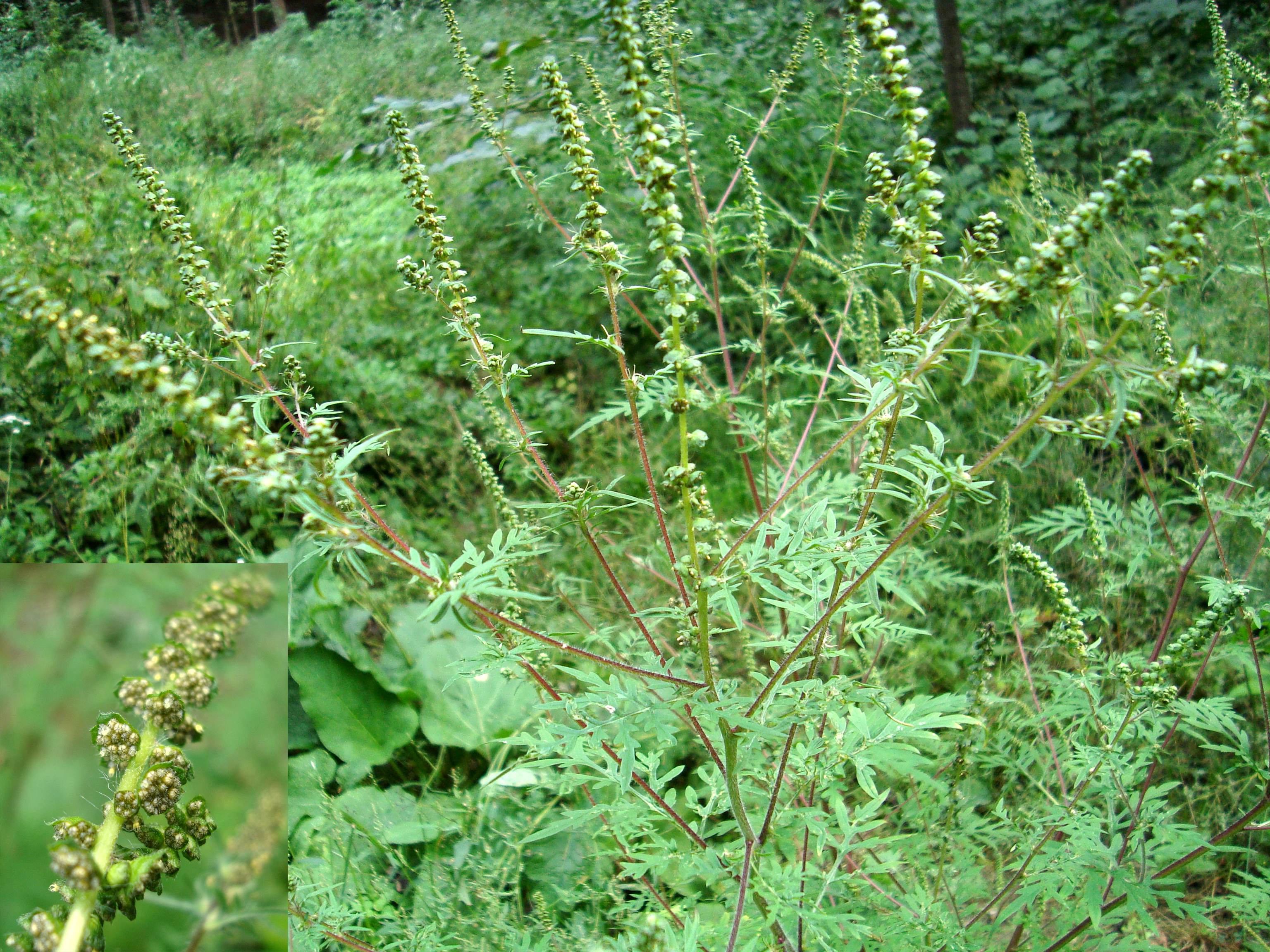 Ambrosia artemisiifolia - rostlina zde nepůvodní, foto Podkomorské lesy Česká republika, jižní Morava